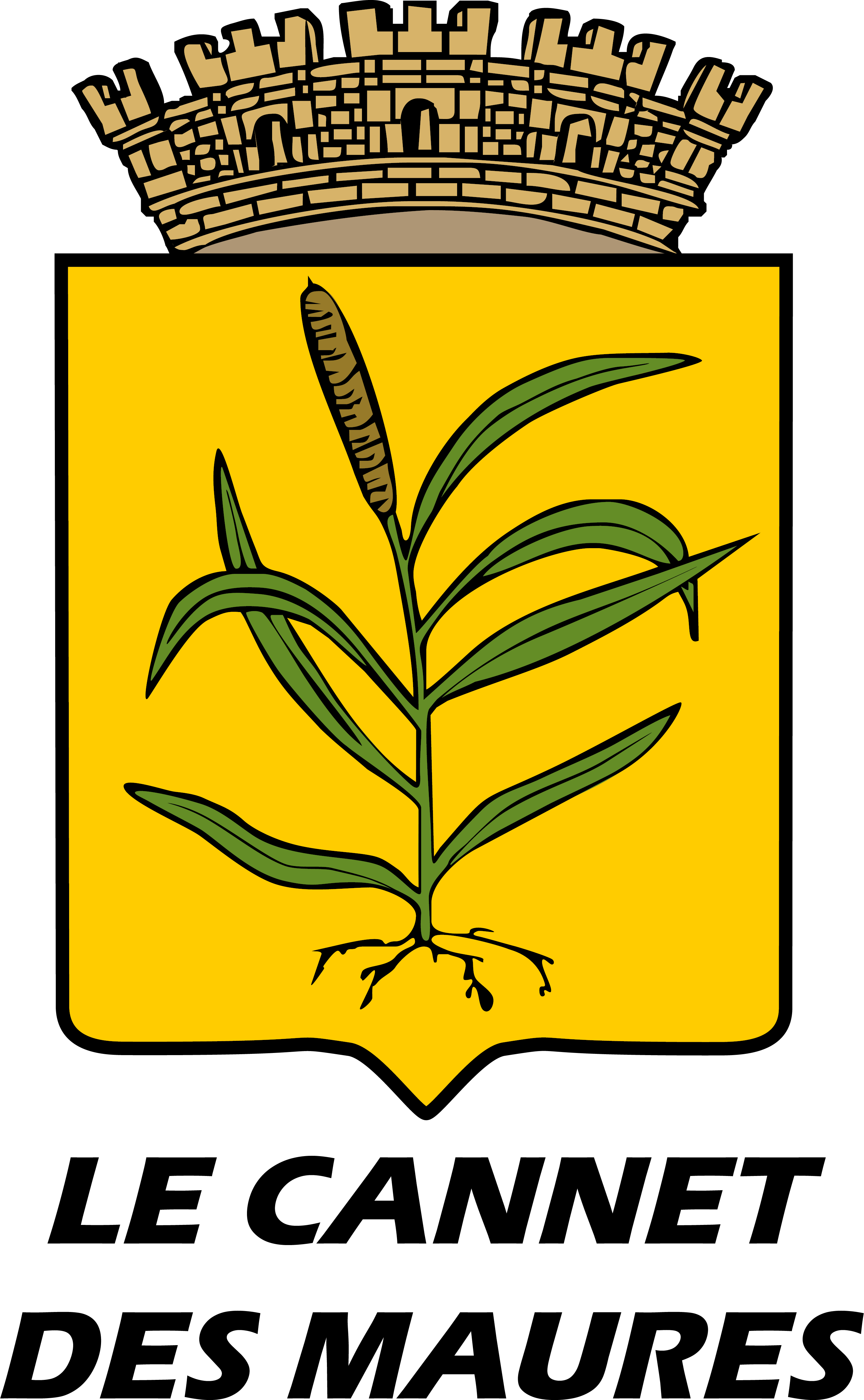 Blason Actuel du Cannet des Maures